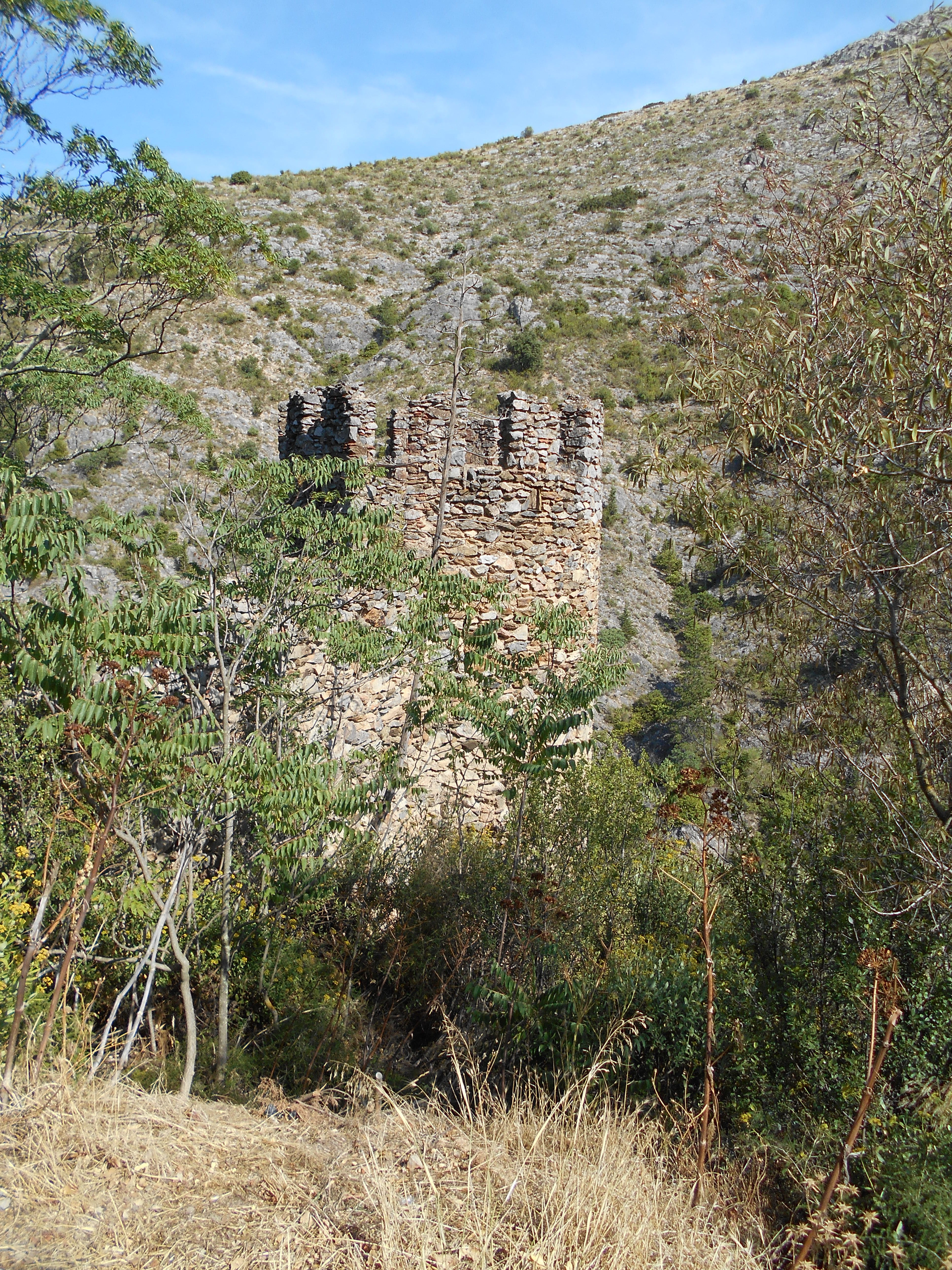 Fragment de la muralla d'enllaç amb el poble fortificat